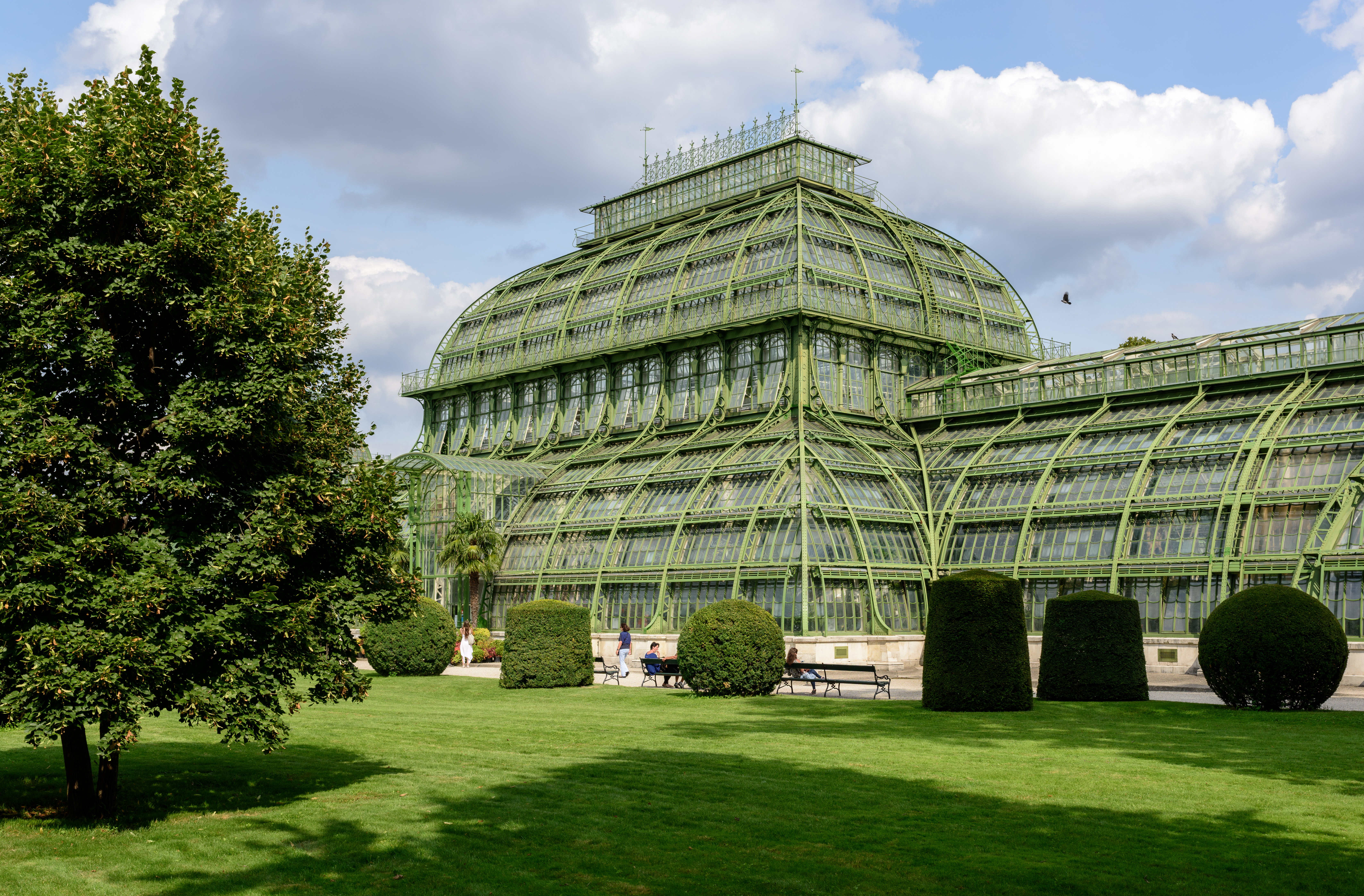 Palmenhaus